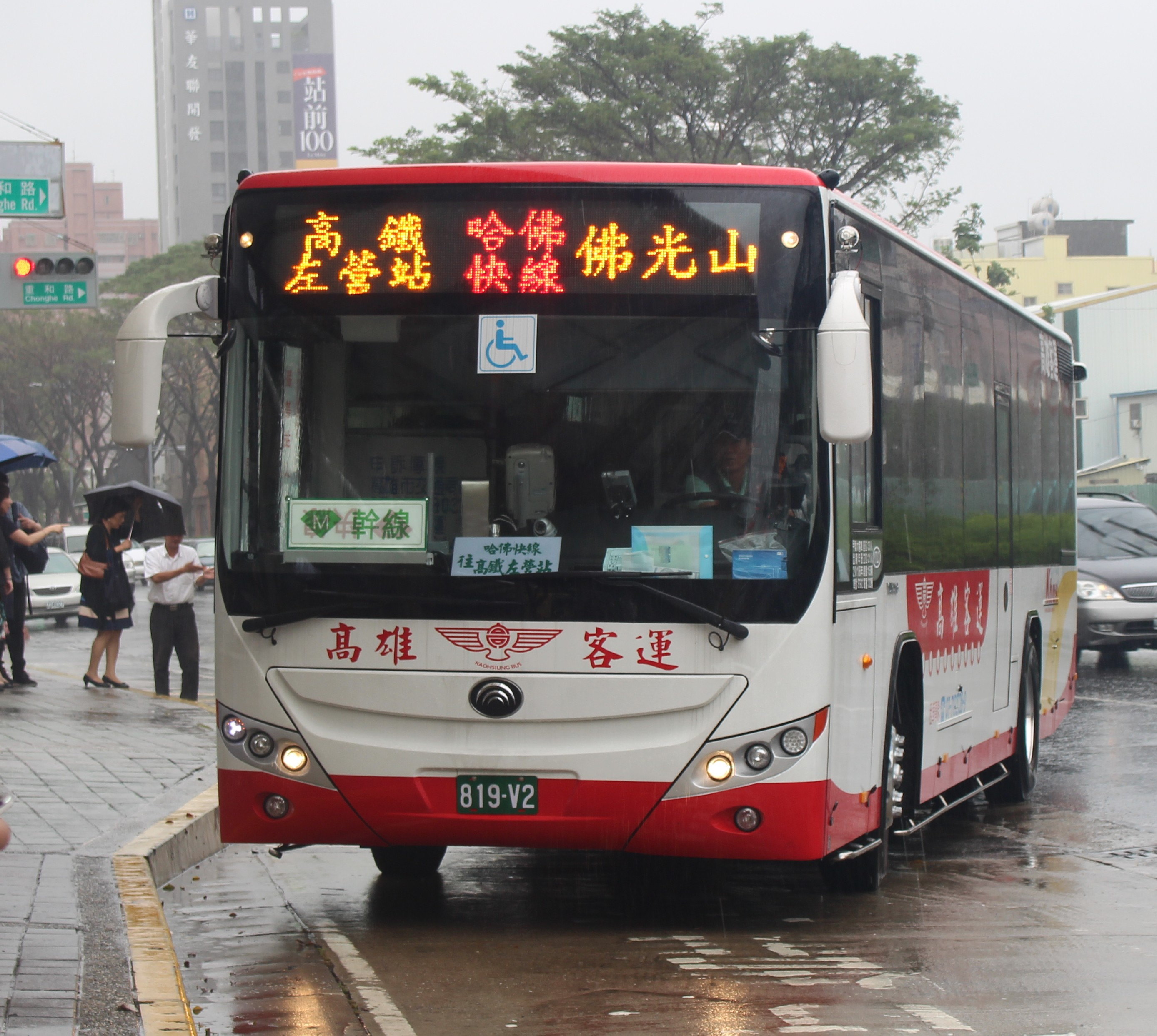 中文（台灣）: 高雄客運台灣宇通ZK6118HGA大客車819-V2，雨中行駛哈佛快線。